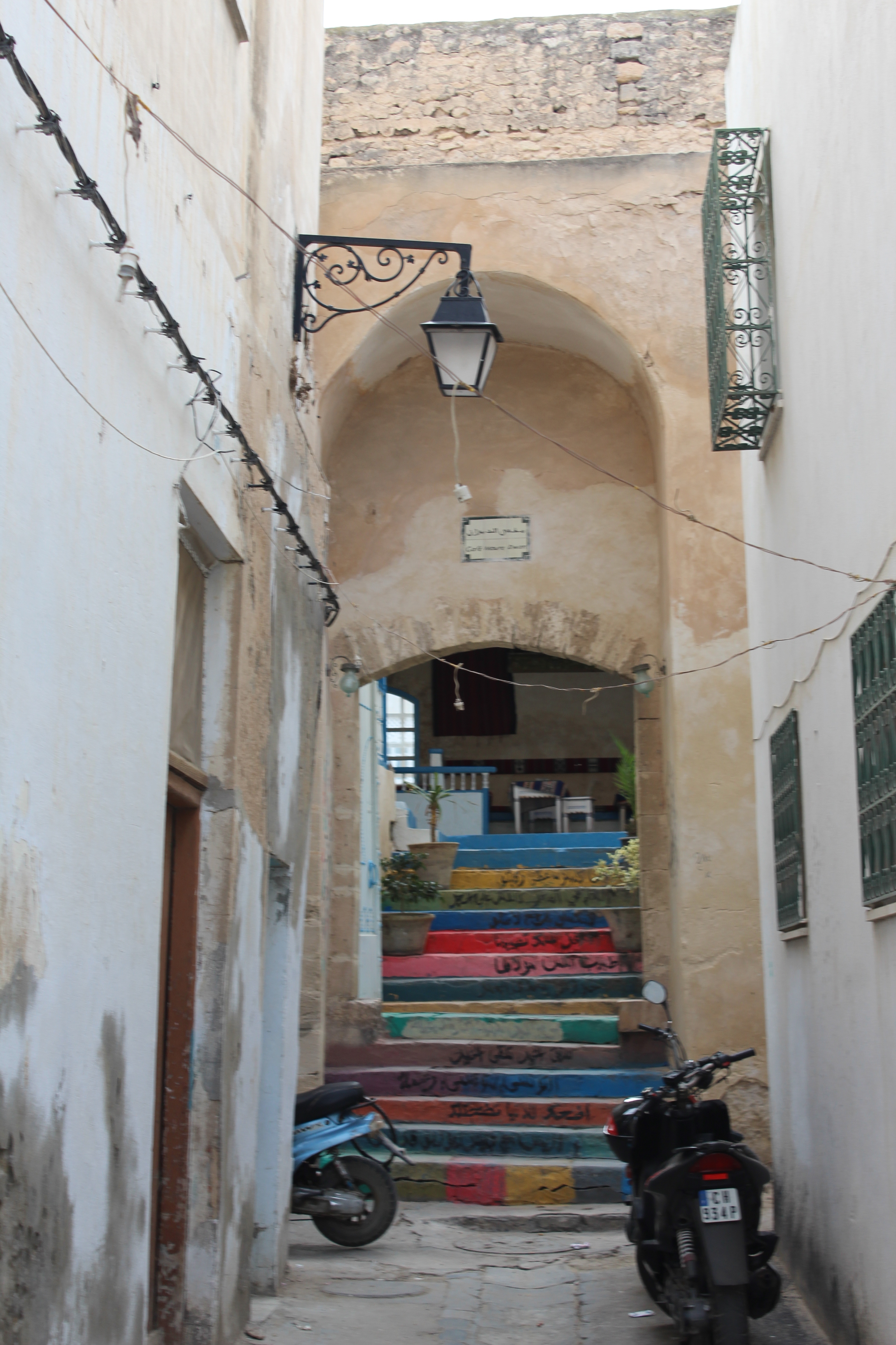 El Diwan Coffee shop